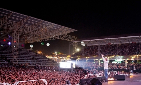 Show do cantor Michel Teló no município de Americana, São Paulo. (Fotógrafo: Igor Duarte)